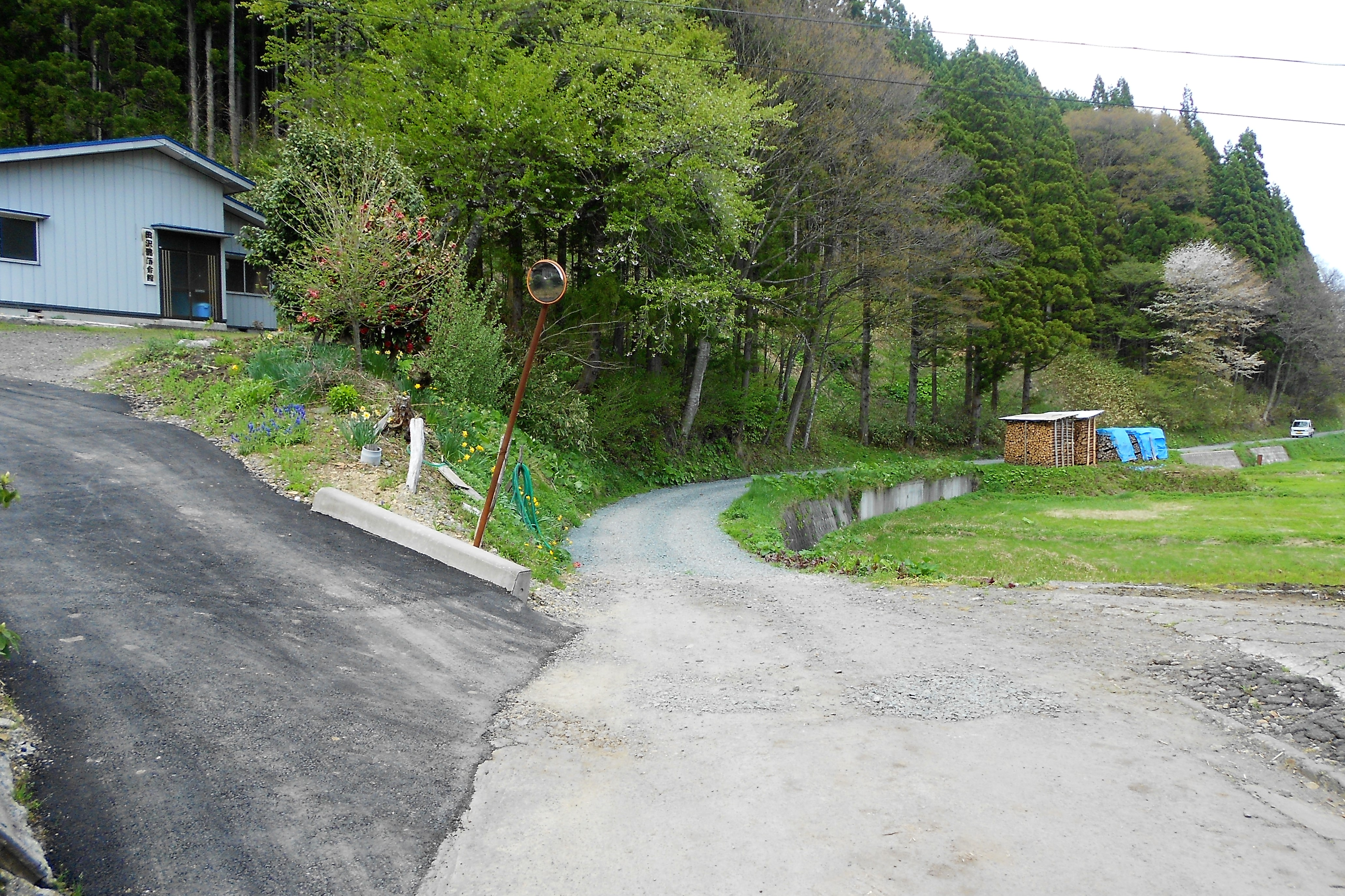 秋田県道102号大館鷹巣線 北秋田市栄字田沢